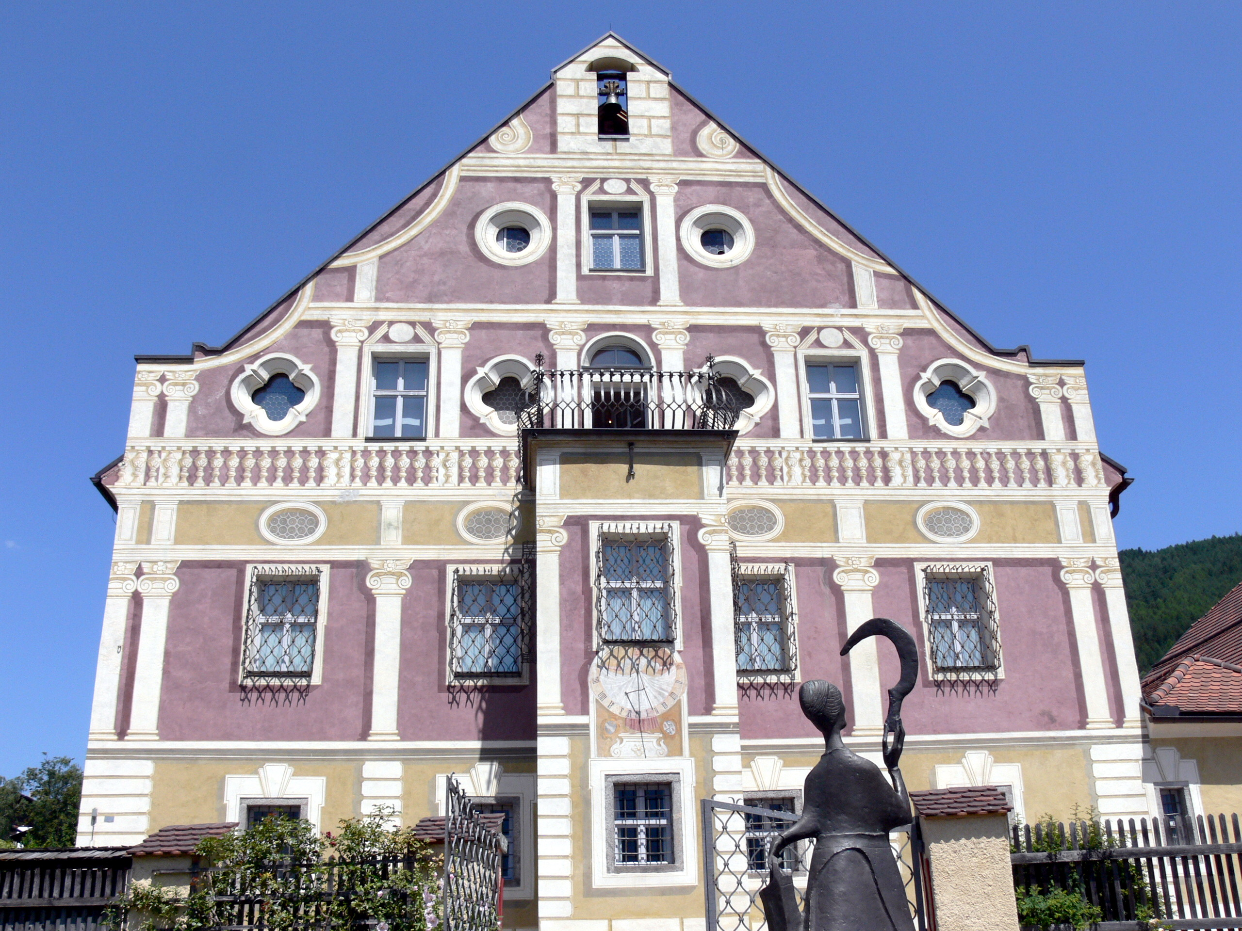 Volkskundemuseum Dietenheim im Pustertal. Ansitz Mair am Hof ( 17.Jhdt. ): Fassade